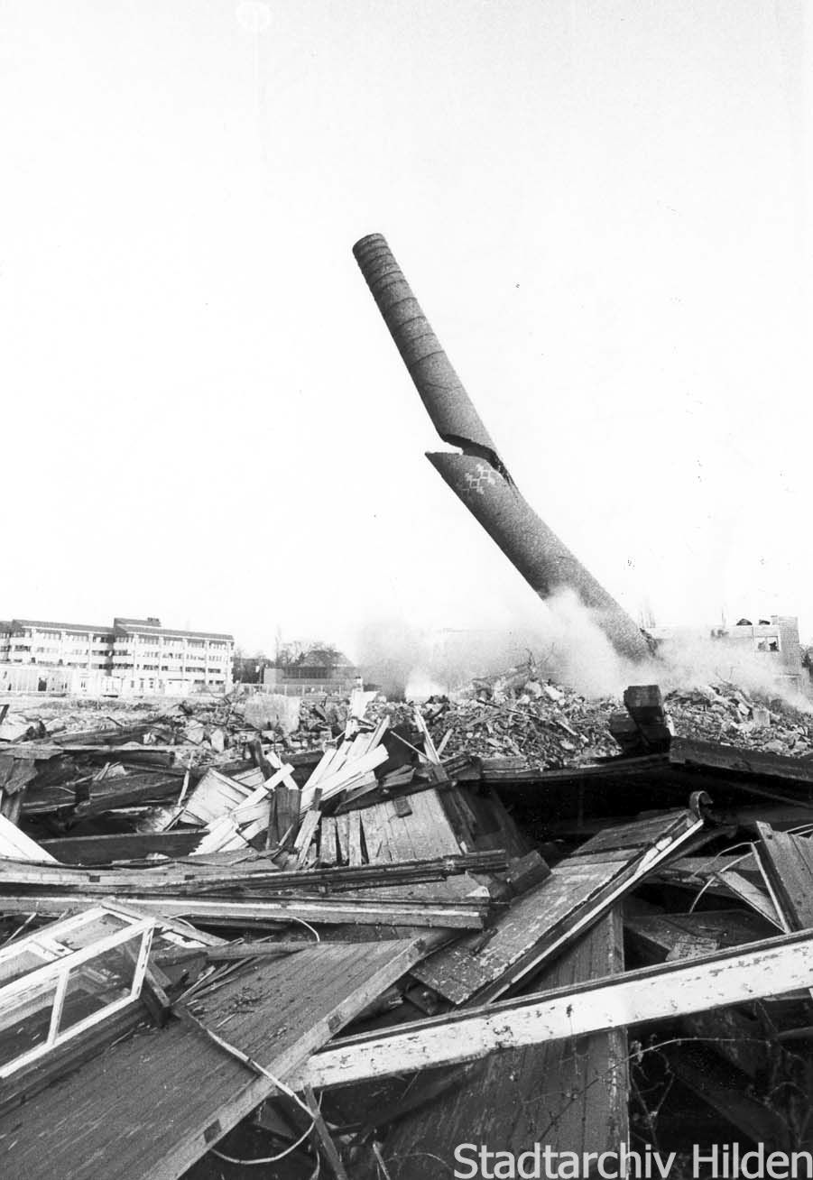 Abriss der Stückfärberei Schlieper & Laag, Neustraße/Hofstraße, Hilden